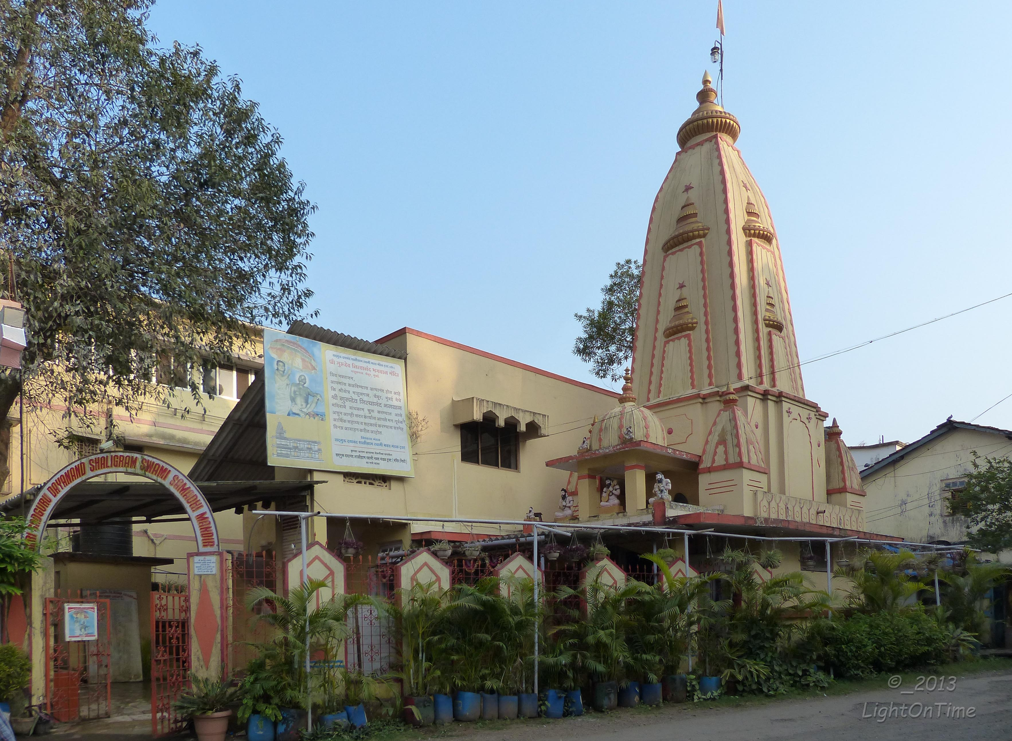 Ganeshpuri_Akloli_2013